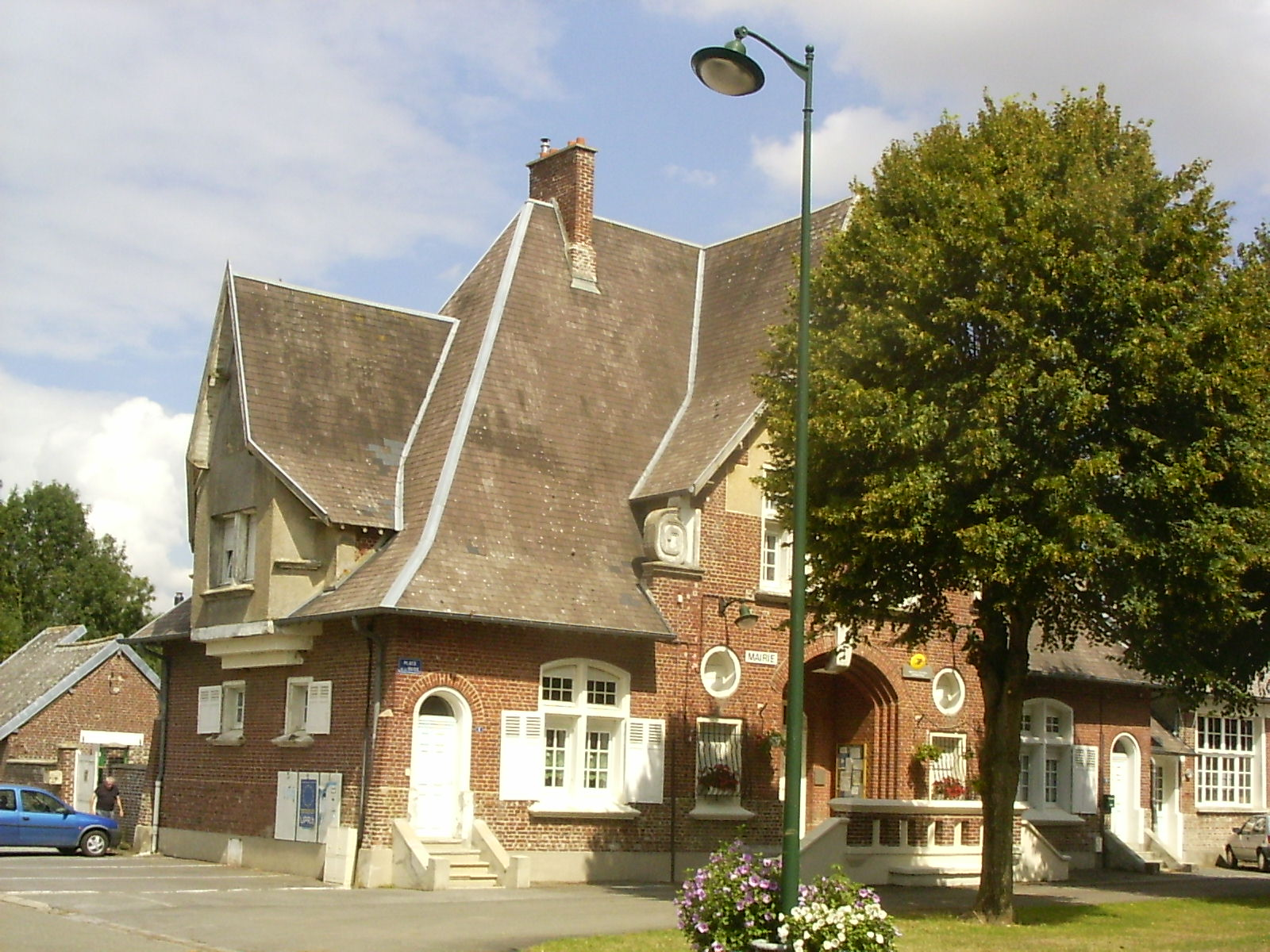 Roupy, burgemeesterij annex postkantoor